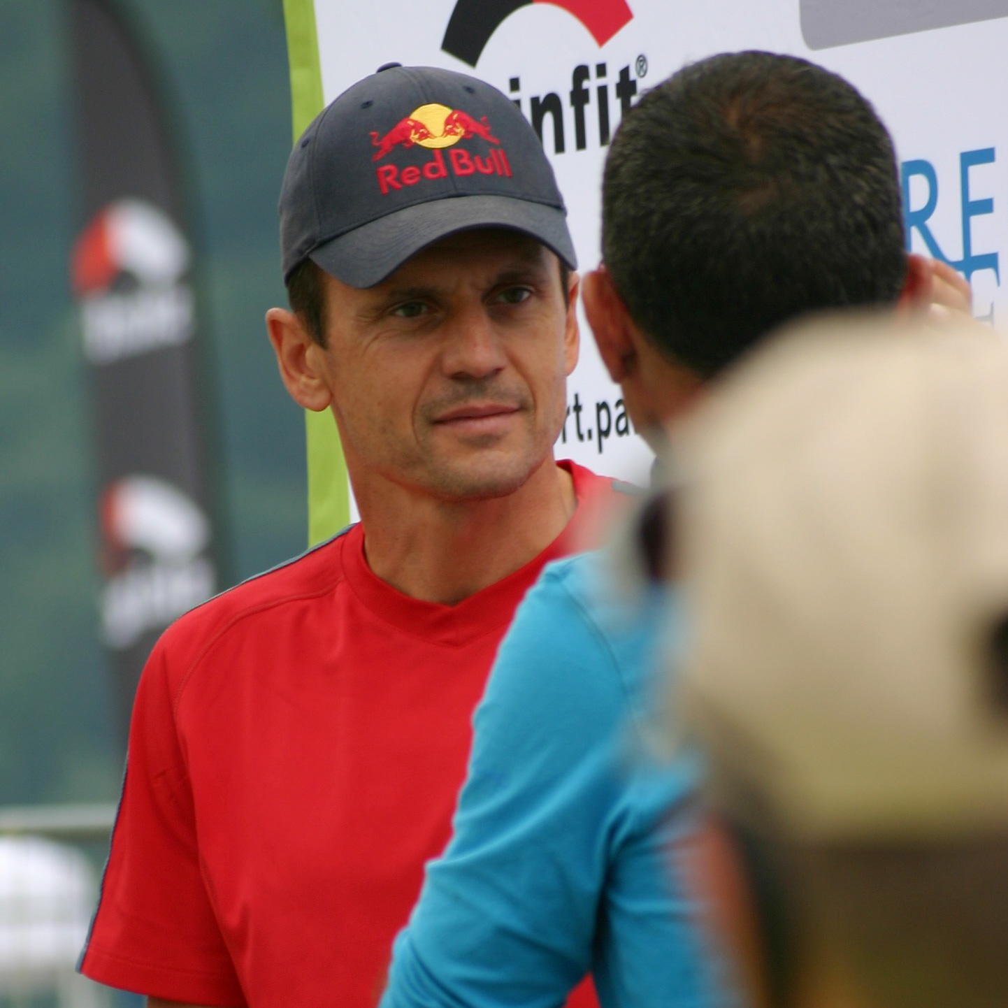 Thomas Hellriegel im Interview am Vortag des Trans Vorarlberg Triathlon